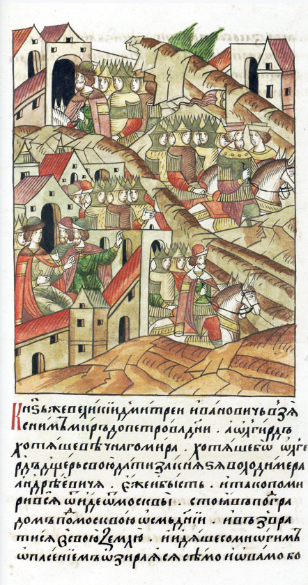 Беларуская (тарашкевіца): Адыход Альгерда ад Масквы. Мініятура, XVI ст. ЛИЦЕВОЙ ЛЕТОПИСНЫЙ СВОД [Ольгерд много завоевал, сжег, убил и захватил в плен, и решил идти обратно, но, узнав, что собралось большое войско и готовится к битве, испугался и начал просить мира.] Князь великий Дмитрий Иванович заключил с ним мир до Петрова дня, но Ольгерд хотел заключить мир навеки и решил отдать за князя Владимира Андреевича свою дочь, что и произошло. И, заключив мир, отошел князь от Москвы, пробыв под Москвою восемь дней, и вернулся в свое княжество, идя осторожно, озираясь по сторонам, опасаясь [за собой погони. Князь Михаил Александрович вернулся в Тверь, заключив мир с великим князем Дмитрием Ивановичем.]